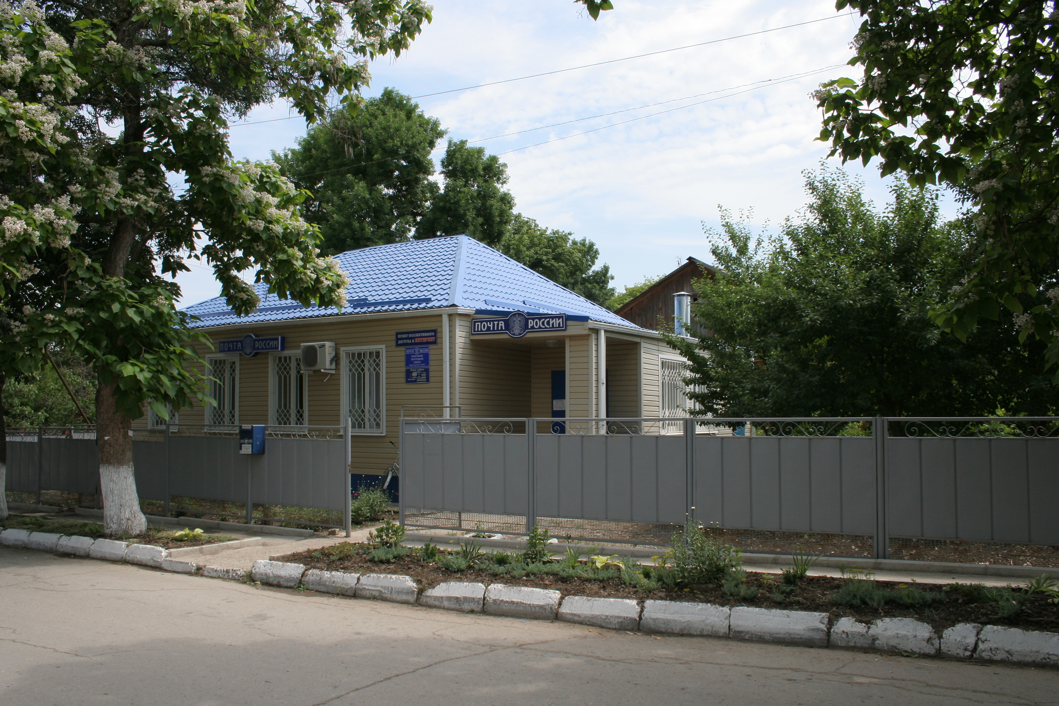 Почта поселка Черноморского